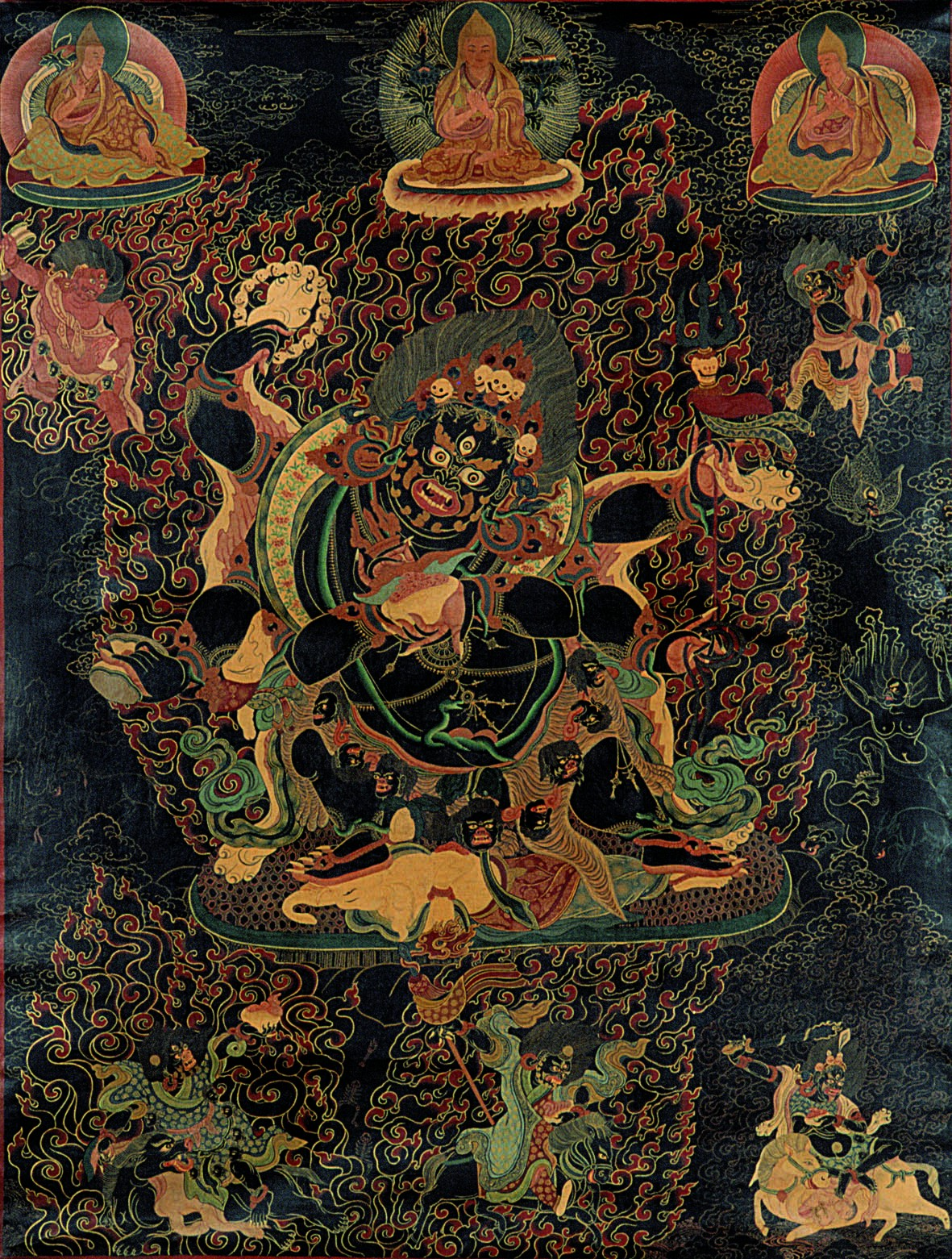 Goache auf Baumwolle, spätes 17. Jahrhundert, Zentralregion Tibets